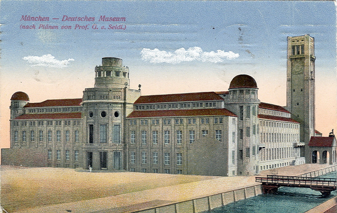 Postkarte, datiert 29.4.1918. Beschriftung: "München - Deutsches Museum (nach Plänen von Prof. G. v. Seidl )."